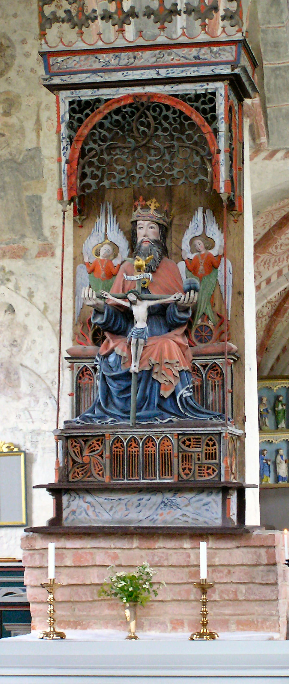 Sankt Olofs Kirke i Skåne, Treenighedsalter, 'Nådestolen'